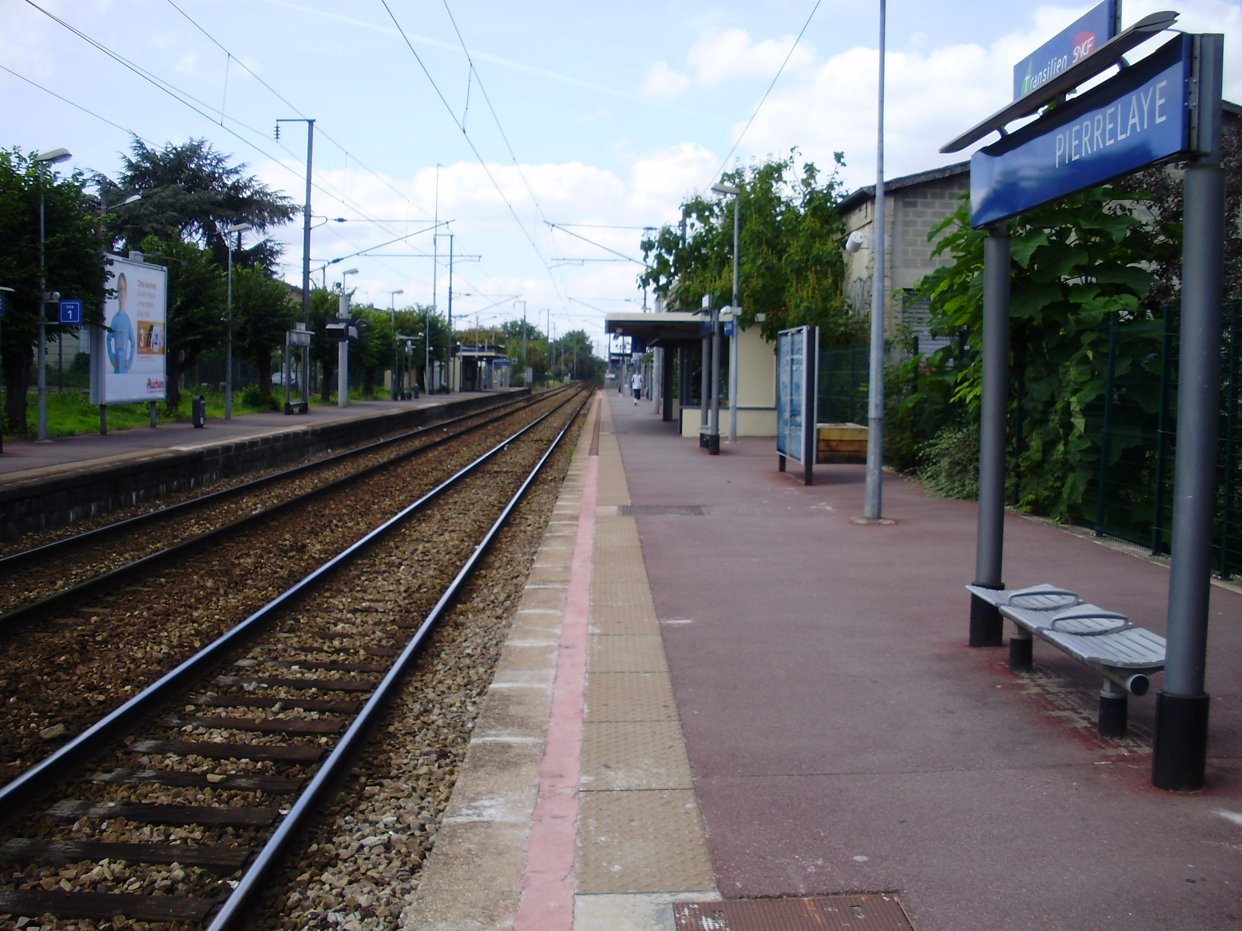 Gare de Pierrelaye, Val-d'Oise, France : quais et voies vus depuis le milieu du quai pour Paris, en regardant vers Pontoise